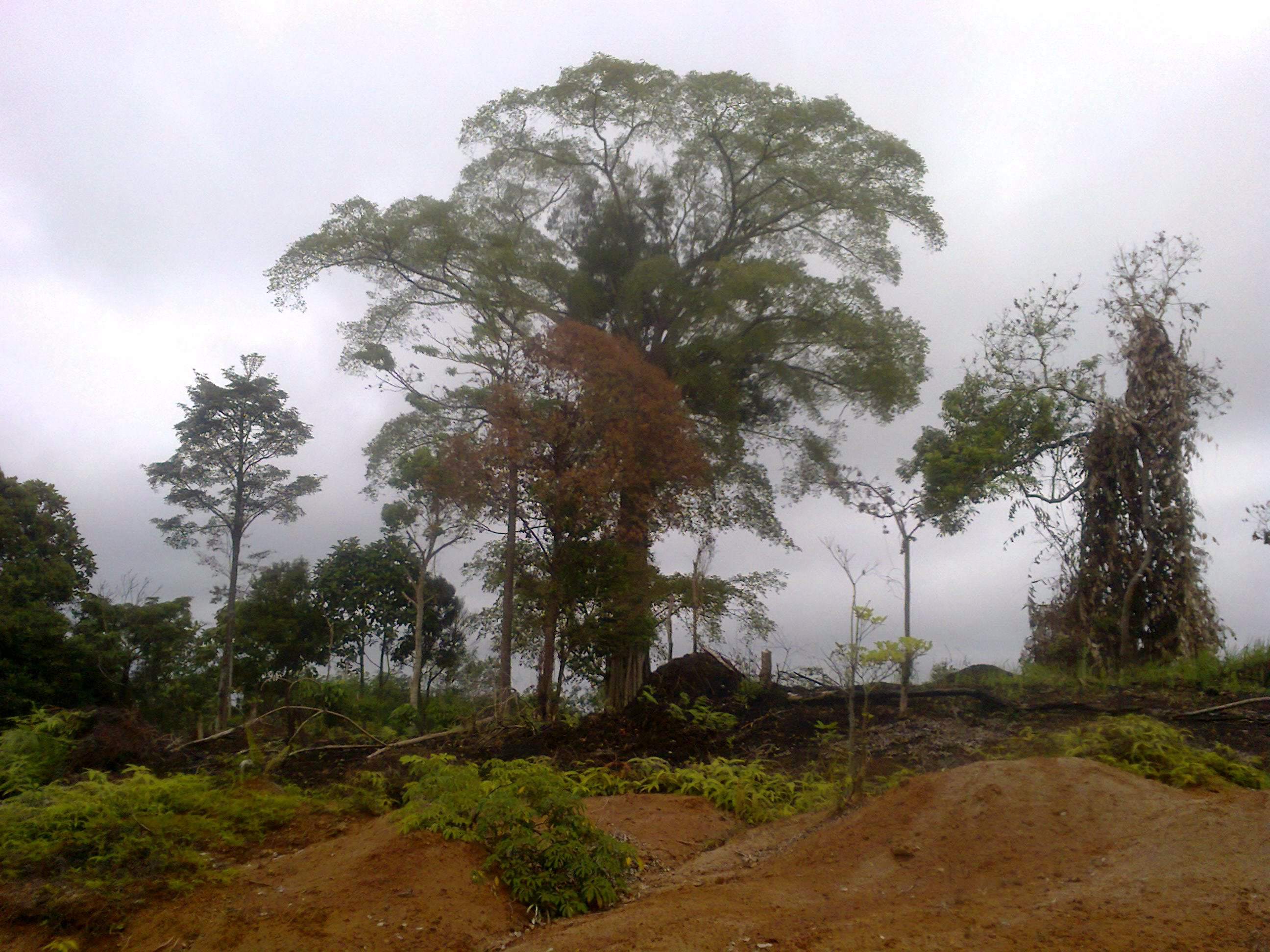 Kayu Aro